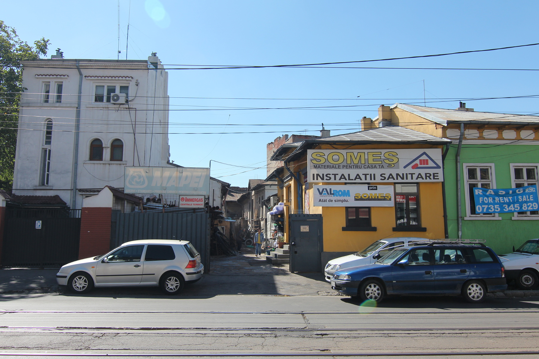 Imobil pe Calea Călărașilor